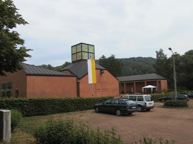 Kirchenneubau (Kirchweih 9.7.2000) St. Kilian (Kath.) in Bad Liebenstein.